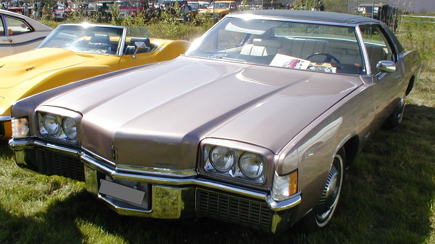 1971 Oldsmobile Toronado